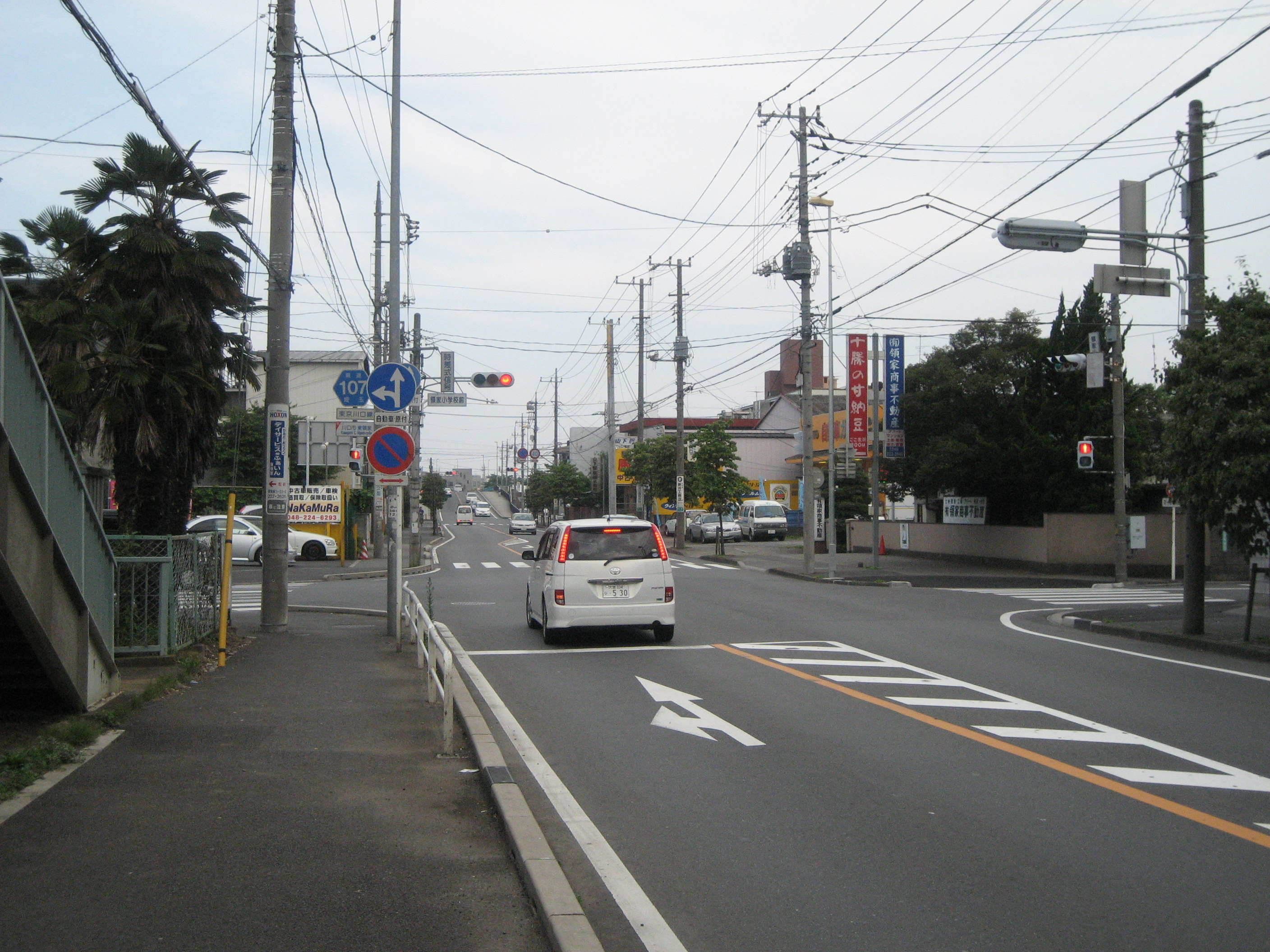 埼玉県道１０７号線川口市内